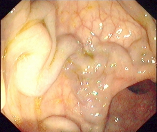 Endoskopische Aufnahme einer Rektumvarize (rektale Krampfader, keine Hämorrhoiden!)